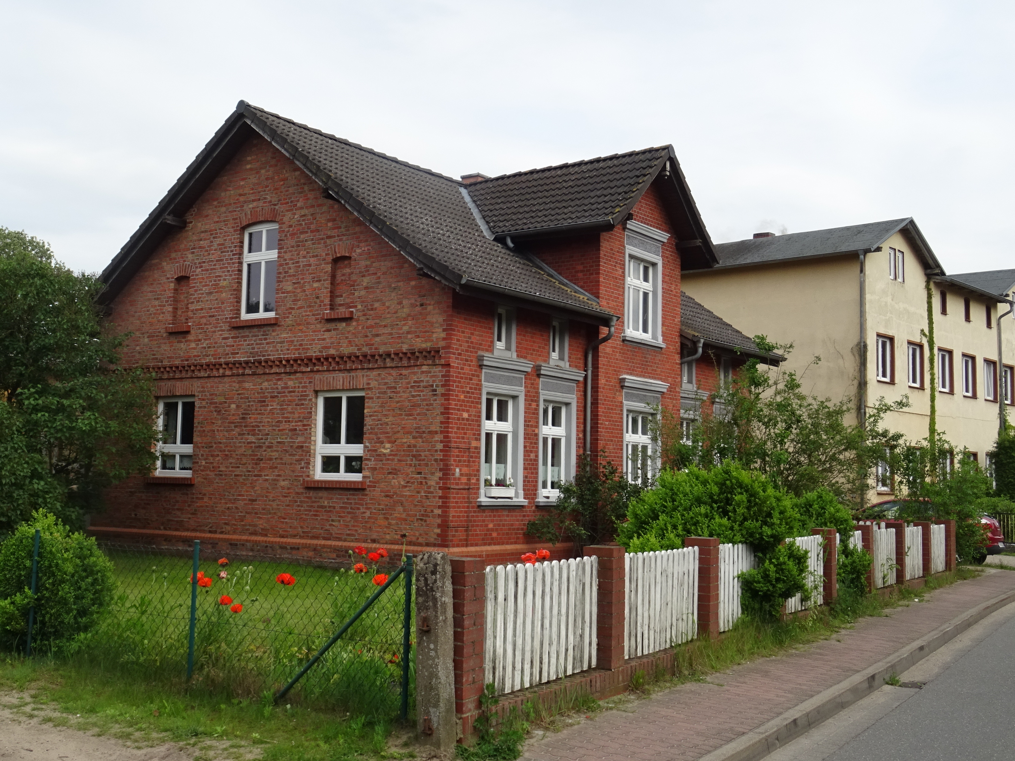 Hammer an der Uecker, denkmalgeschütztes Wohnhaus Straße der Befreier 8